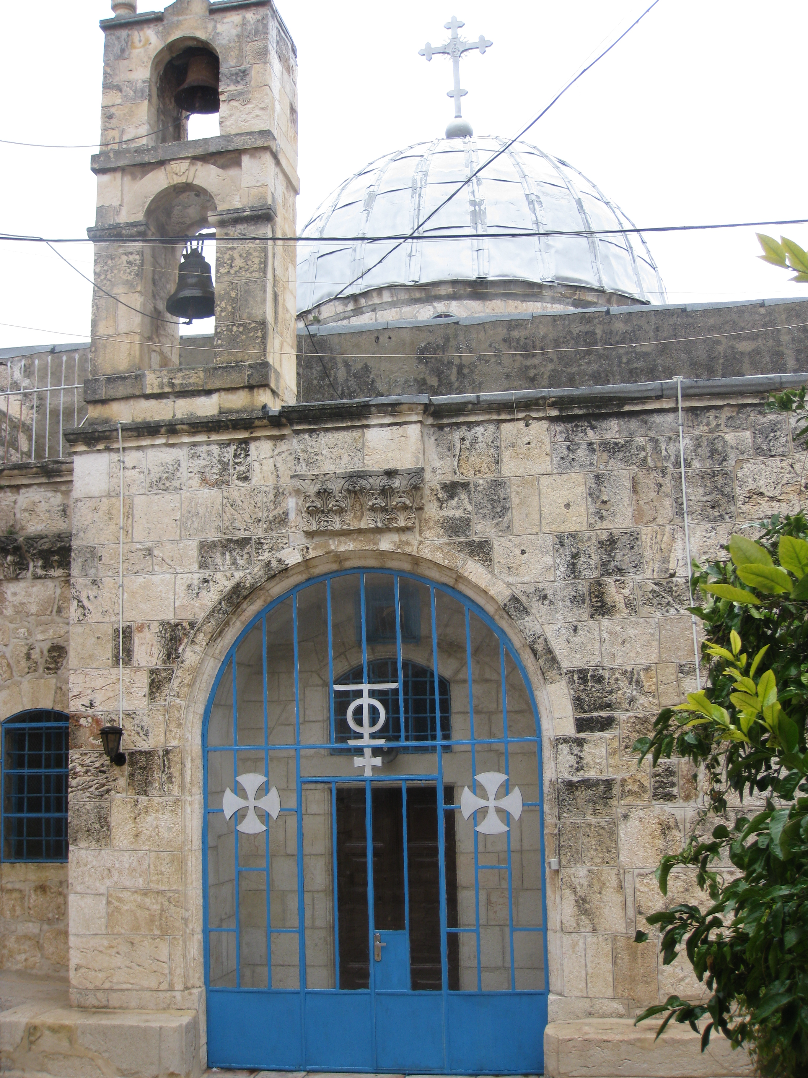 The Christian Quarter - Church of John the Baptist הרובע הנוצרי בעיר העתיקה של ירושלים כנסיית יוחנן המטביל